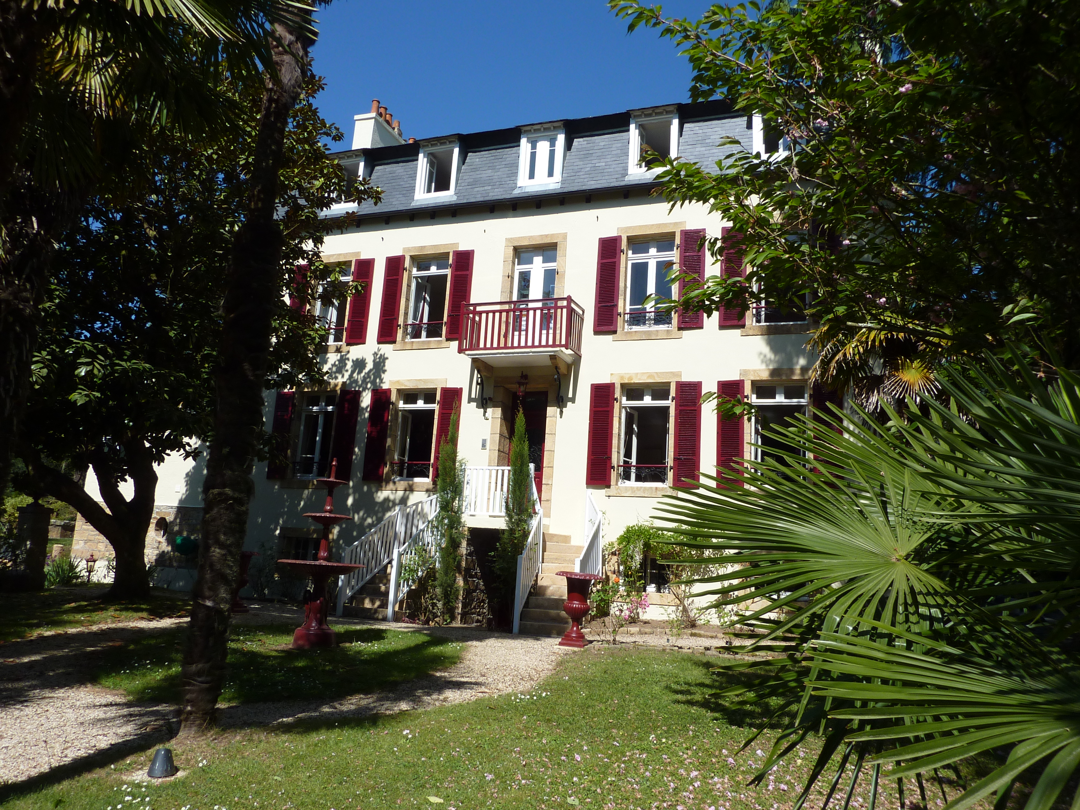 Le manoir de Moulin Mer